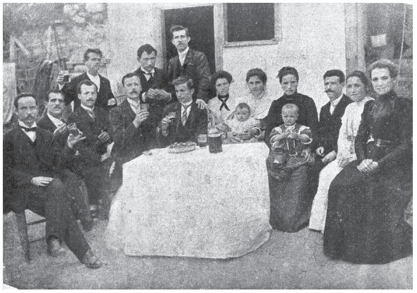 Български учителив в Енидже Вардар, 1905.